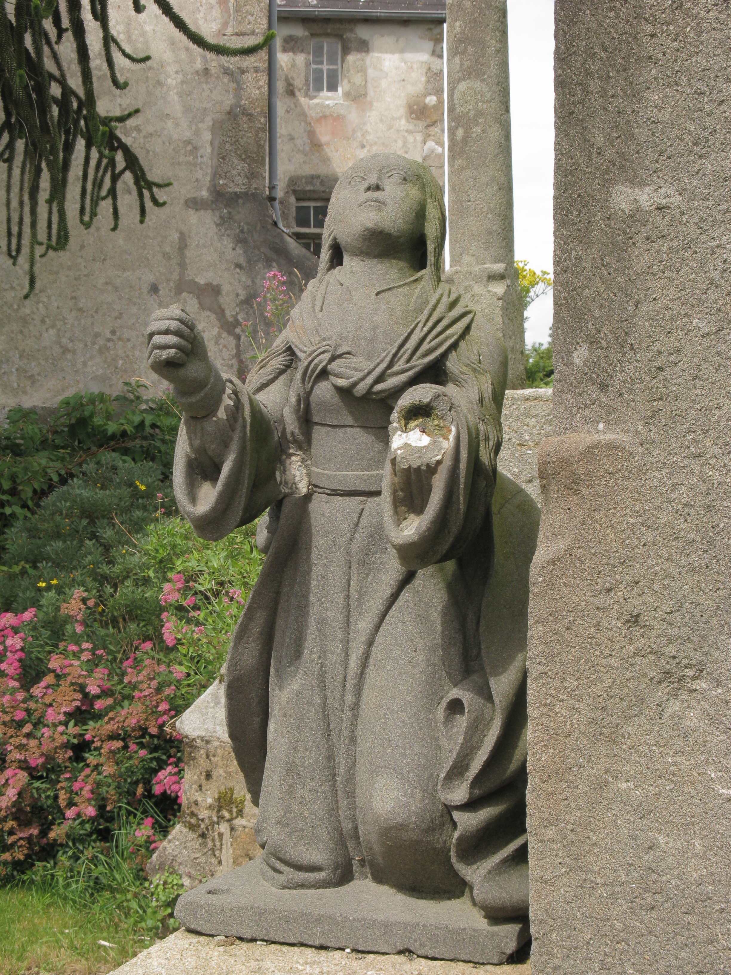 Enclos paroissial van Pencran, Bretagne